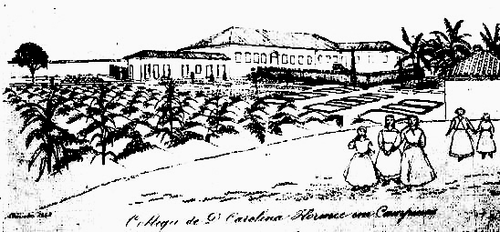 Hercule Florence: Collegio Carolina Florence in Campinas nach 1863 vor 1879